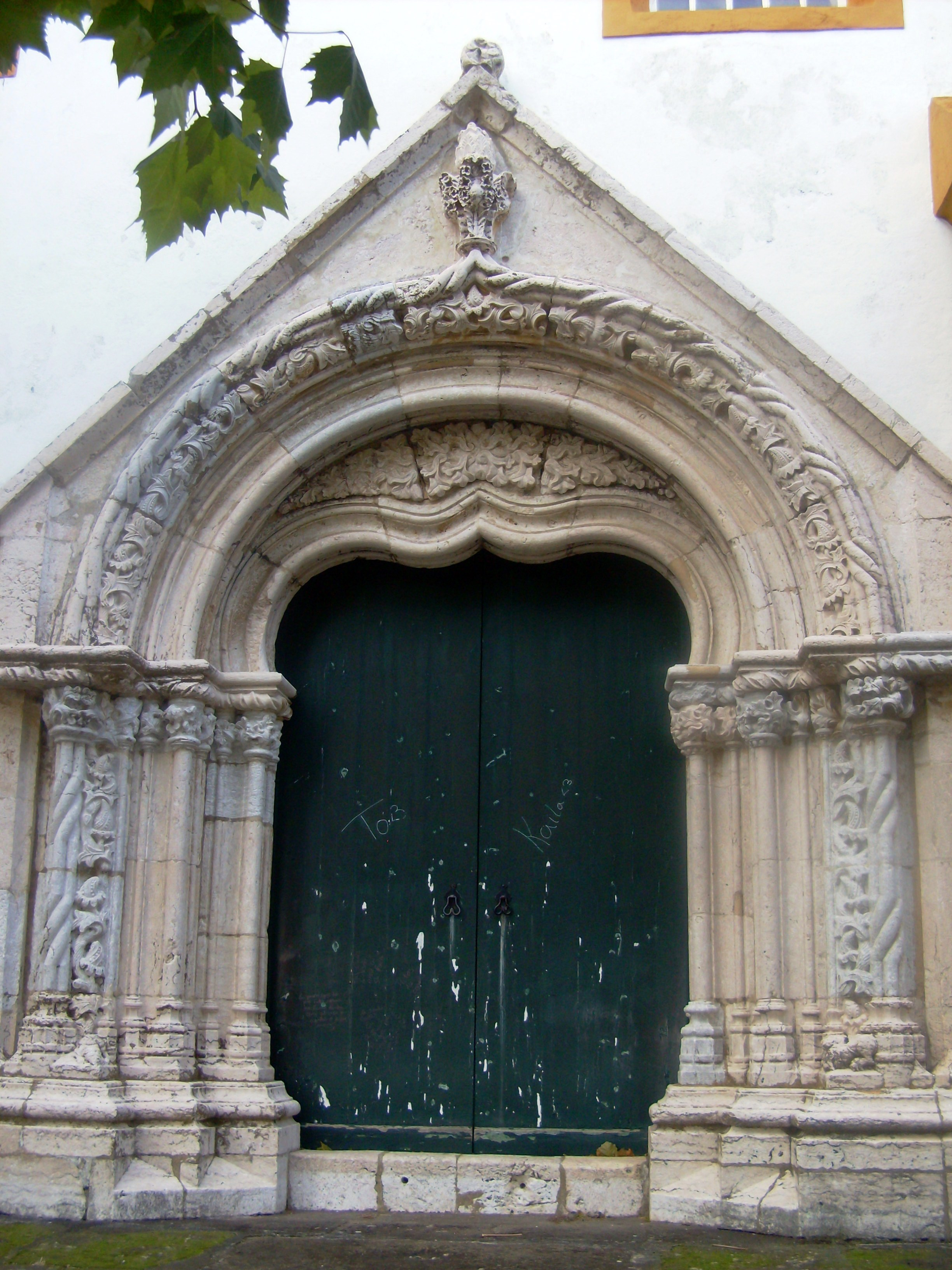 Igreja Matriz de Santa Cruz, Praia da Vitória, Ilha Terceira, Açores: portada lateral direita.